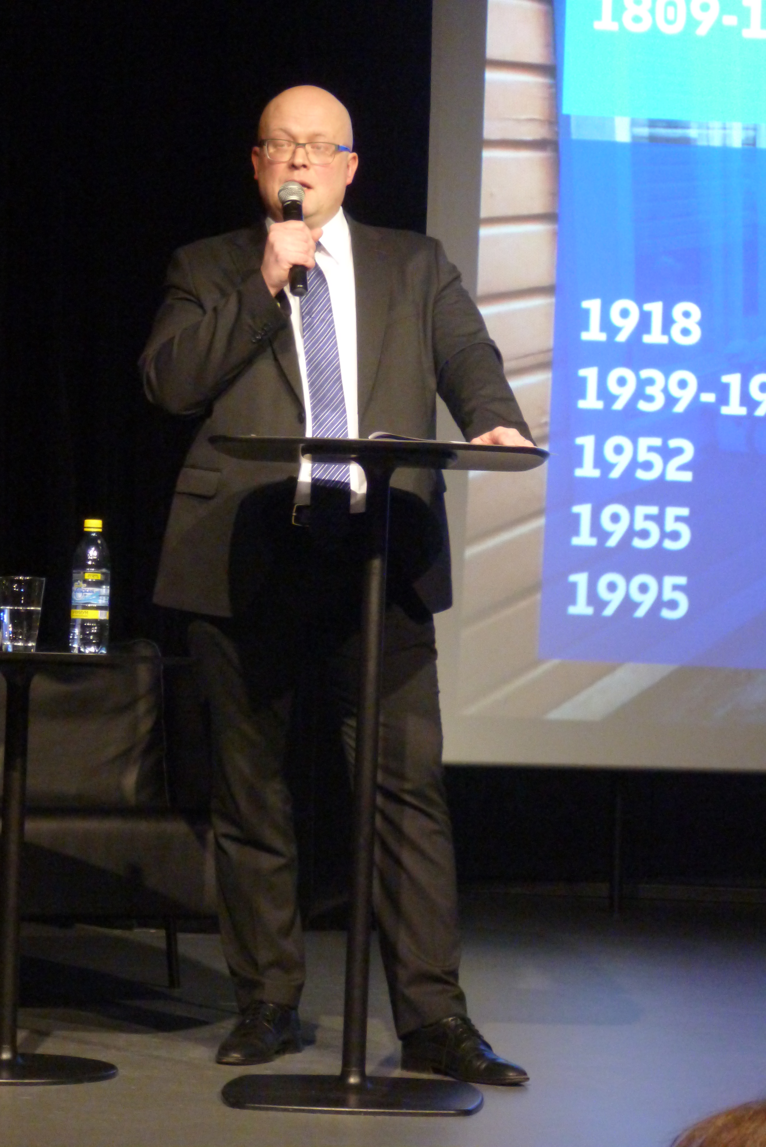 Посол Финляндии в России Микко Хаутала в Ельцин-центре 25 марта 2019 года